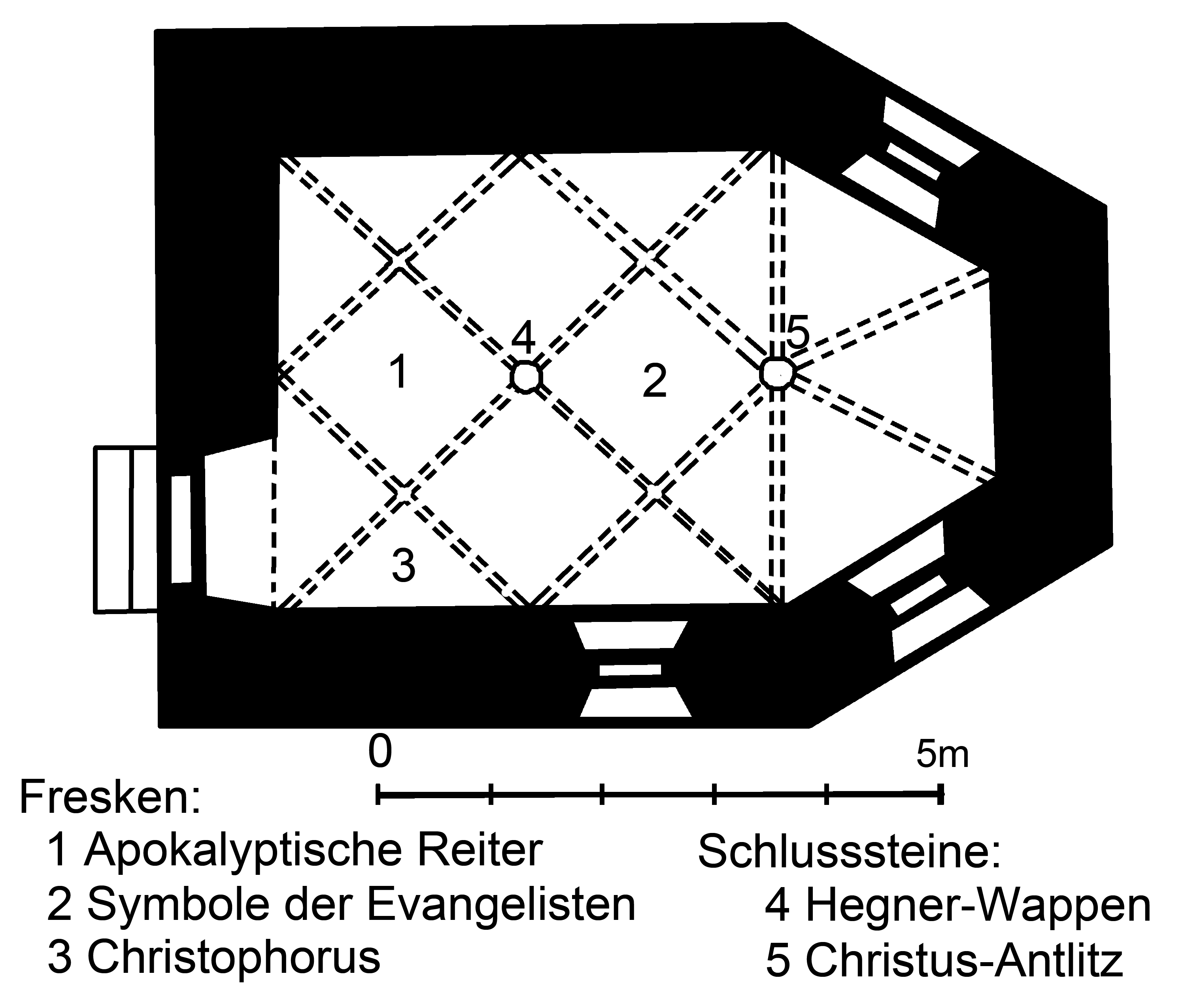 Grundriss der Schlosskapelle von Altenweiher mit Ergänzung der Position verschiedener Fresken und Schlusssteine